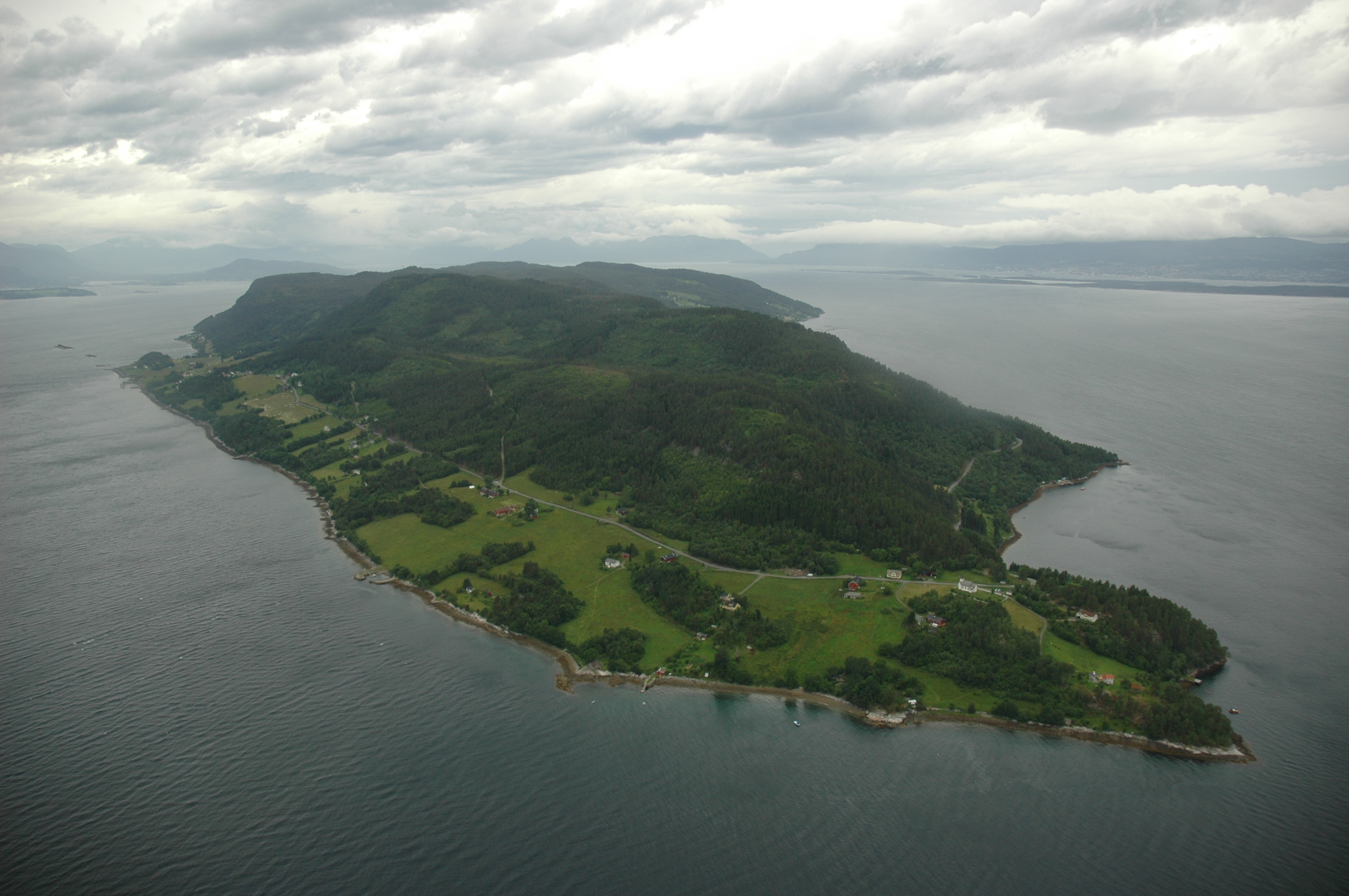 Sekken island, Norway